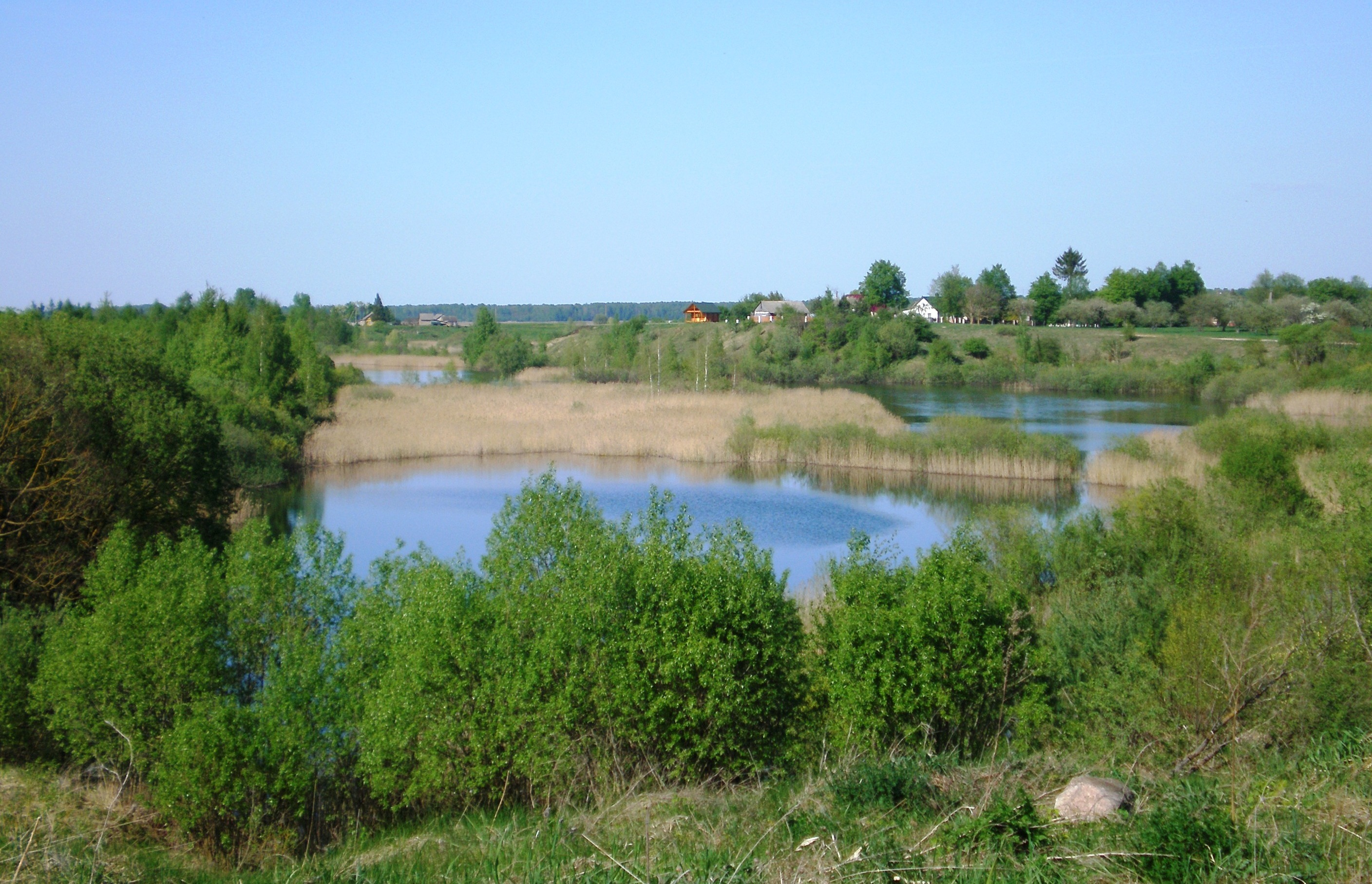 Liolių tvenkiniai, Kėdainių raj.